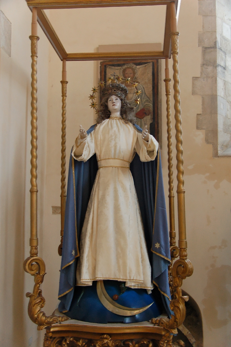 Atri 2011